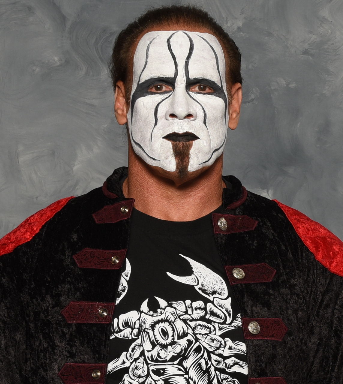 17fscb0298